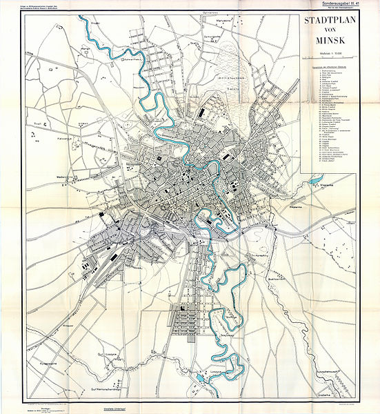 Карта Мінска 1941 нямецкая з тапаграфіяйБеларуская (тарашкевіца): Мапа Менску 1941 нямецкая з тапаграфіяй